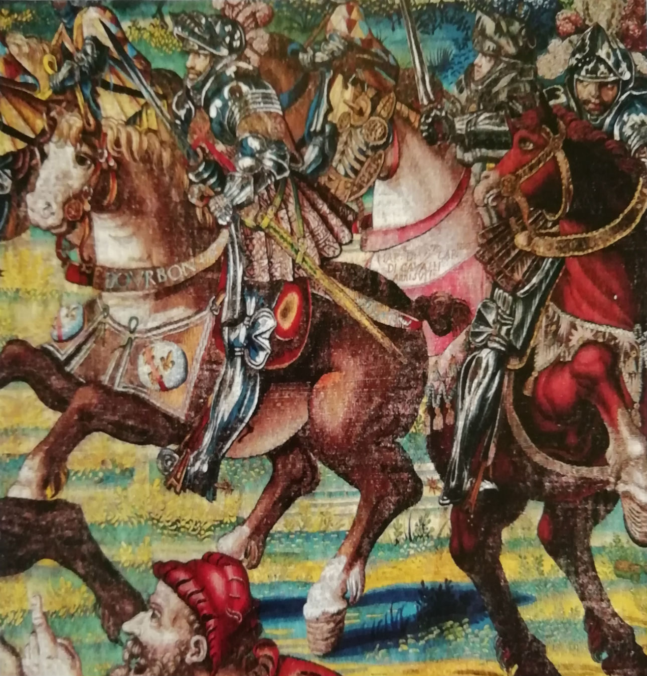 Arazzi Battaglia di Pavia - Carlo di Borbone